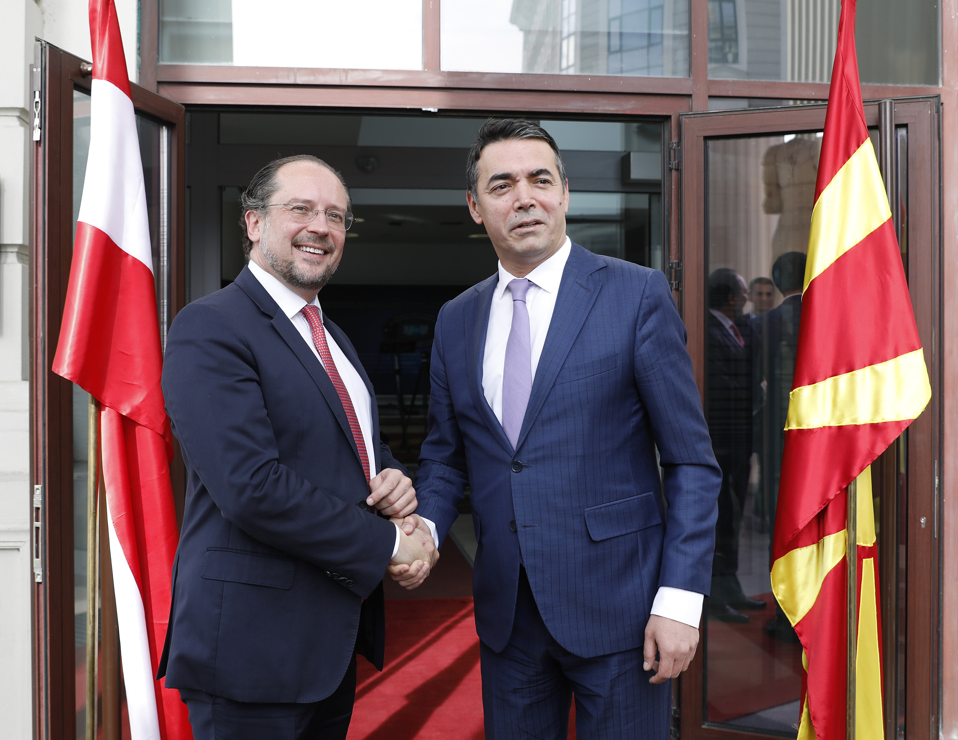 Arbeitsbesuch von BM Alexander Schallenberg in Skopje. Treffen mit dem Außenminister von Nordmazedonien, Nikola Dimitrov. Skopje. 07.10.2019, Foto: Dragan Tatic